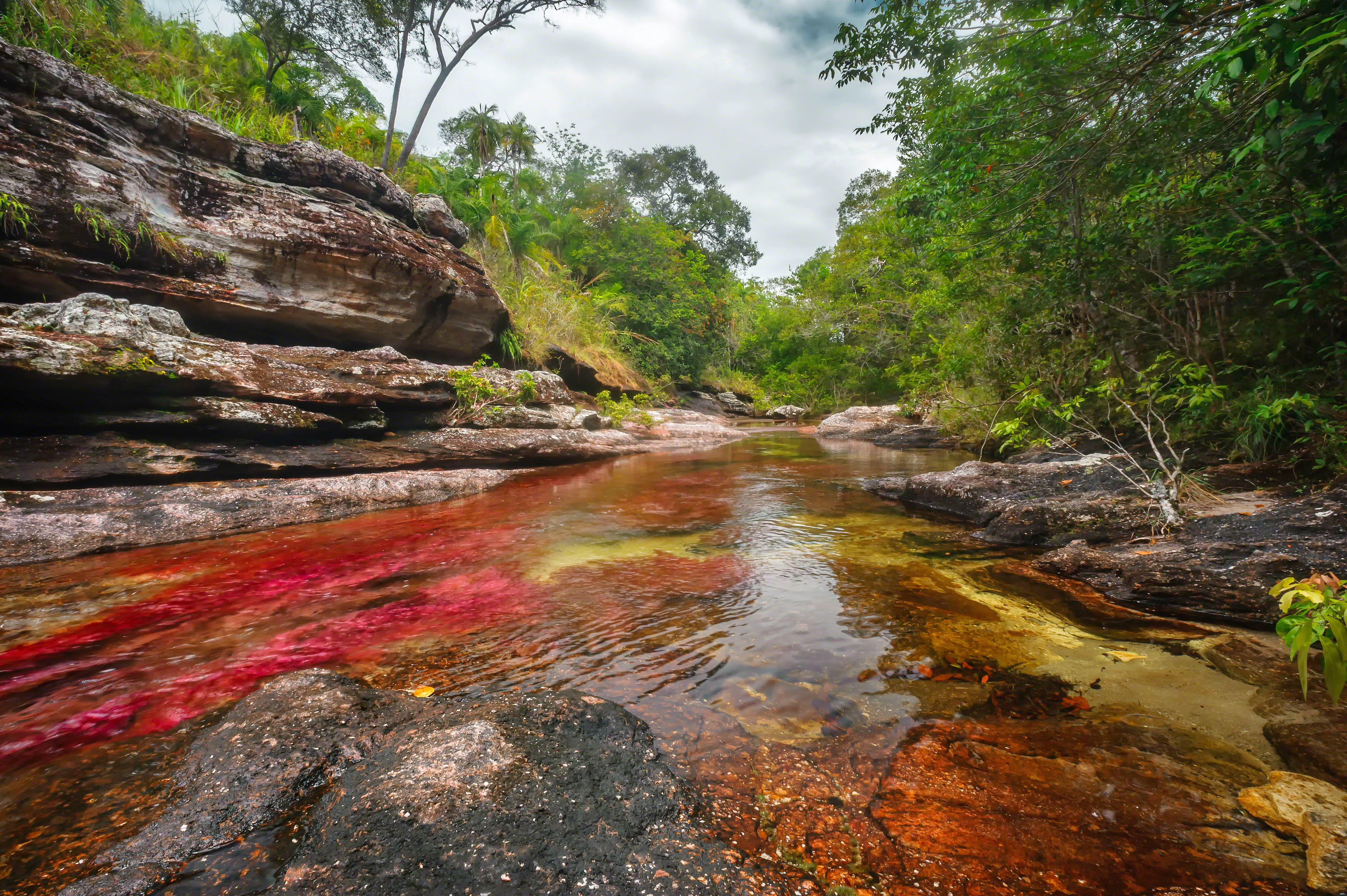 Es uno de los ríos más hermosos del mundo, está ubicado en La Macarena, Meta y se llama Caño Cristales. Fotografía por Mario Carvajal, Licenciada con Creative Commons Reconocimiento 3.0 Unported. Usted puede usar esta imagen en cualquier proyecto, inclusive con fines comerciales, siempre y cuando otorgue el crédito de autoría y el vínculo hacia el proyecto de Caño Cristales, correctamente. (